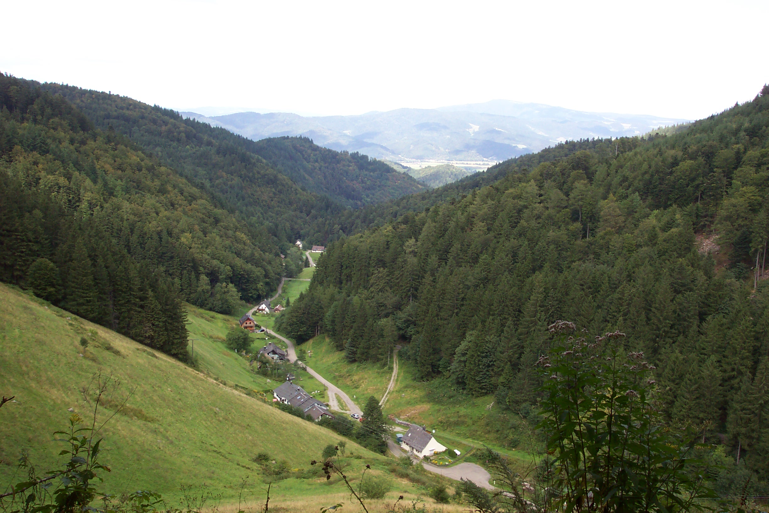 Blick in das Kappeler Tal, am Horizont der Kandel